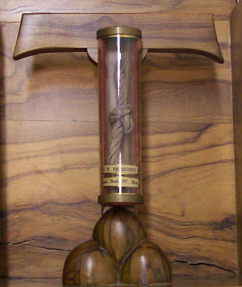 Particolare del reliquiario contenente un frammento della corda di san Francesco conservato nella omonima Basilica di Assisi. Opera propria pubblicata il 12 marzo 2015.